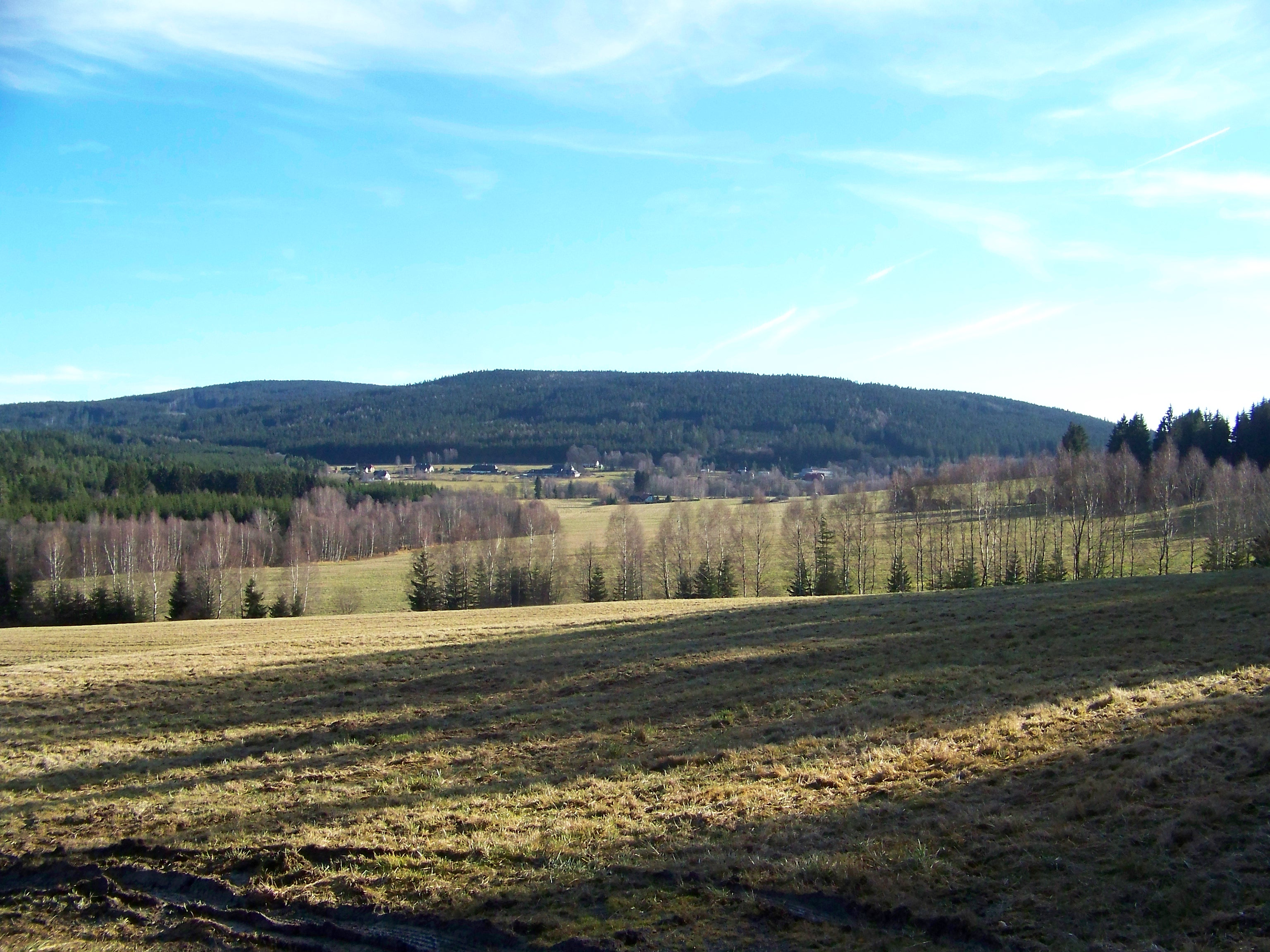 Vesnička Černé Údolí zabíraná ze směru od Benešova nad Černou